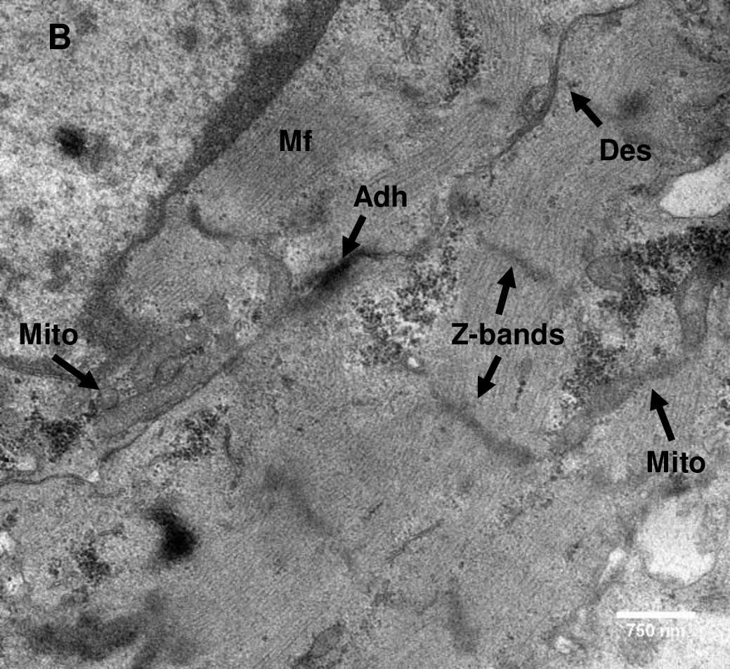 Fig. 5 (B). Maduración ultraestructural de Cardiomiocitos de esferoides de cultivo de hiPSC. La maduración ultraestructural del cardiomiocito hiPSC- se evaluó utilizando Microscopía electrónica de transmisión (TEM) después de 7 días de cultivo con estimulación eléctrica. Mito: mitocondria; Mf: miofibrillas; Des: desmosoma; Adh: unión adherente. Z bandas Z. Barra de escala: 750 nm.